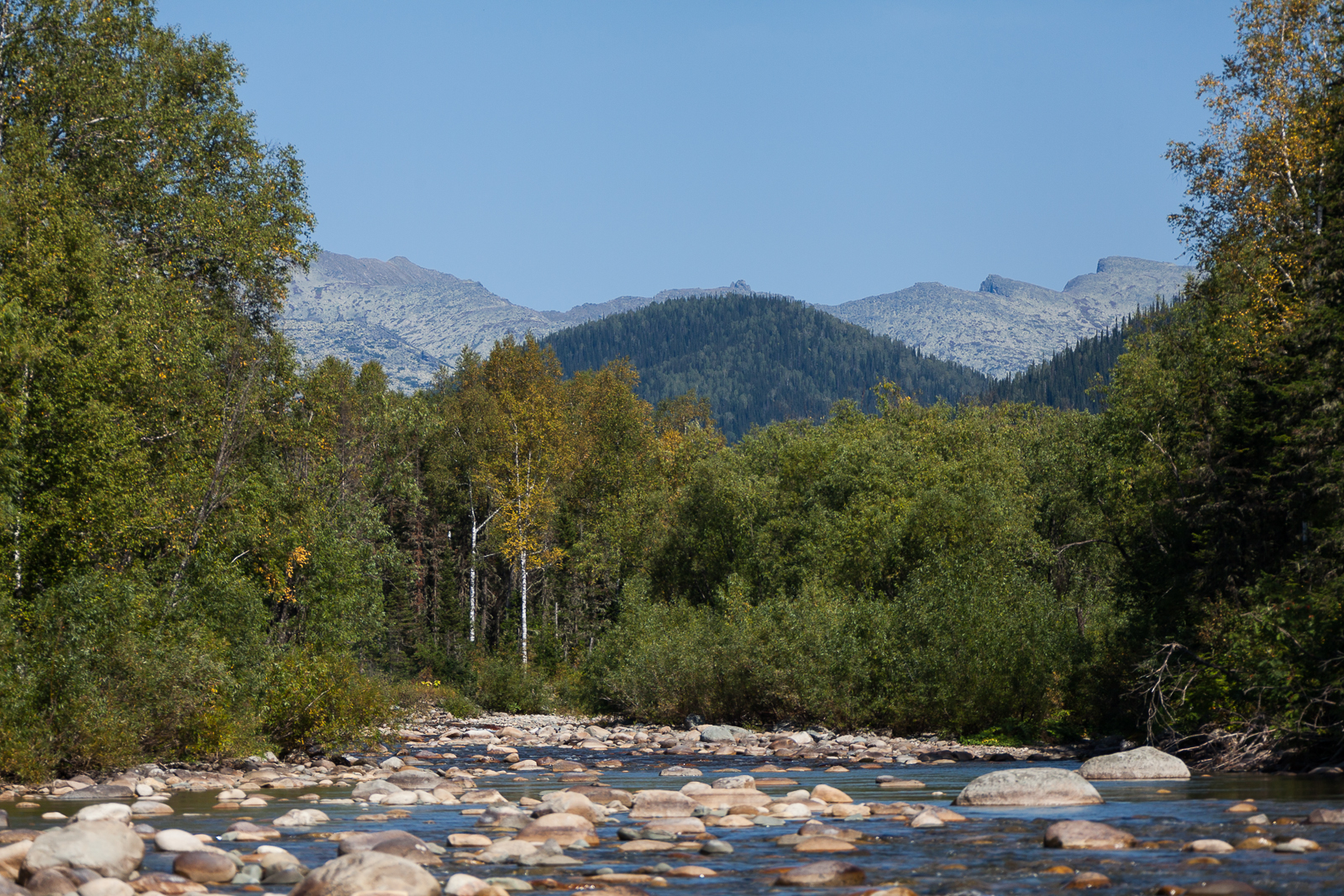 Кузнецкий Алатау, Междуреченский городской округ This image is related to the protected area of Russia number 4200012